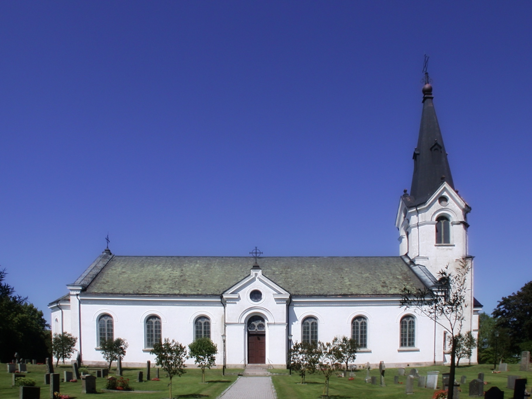 Hassle kyrka, Mariestad, Sweden